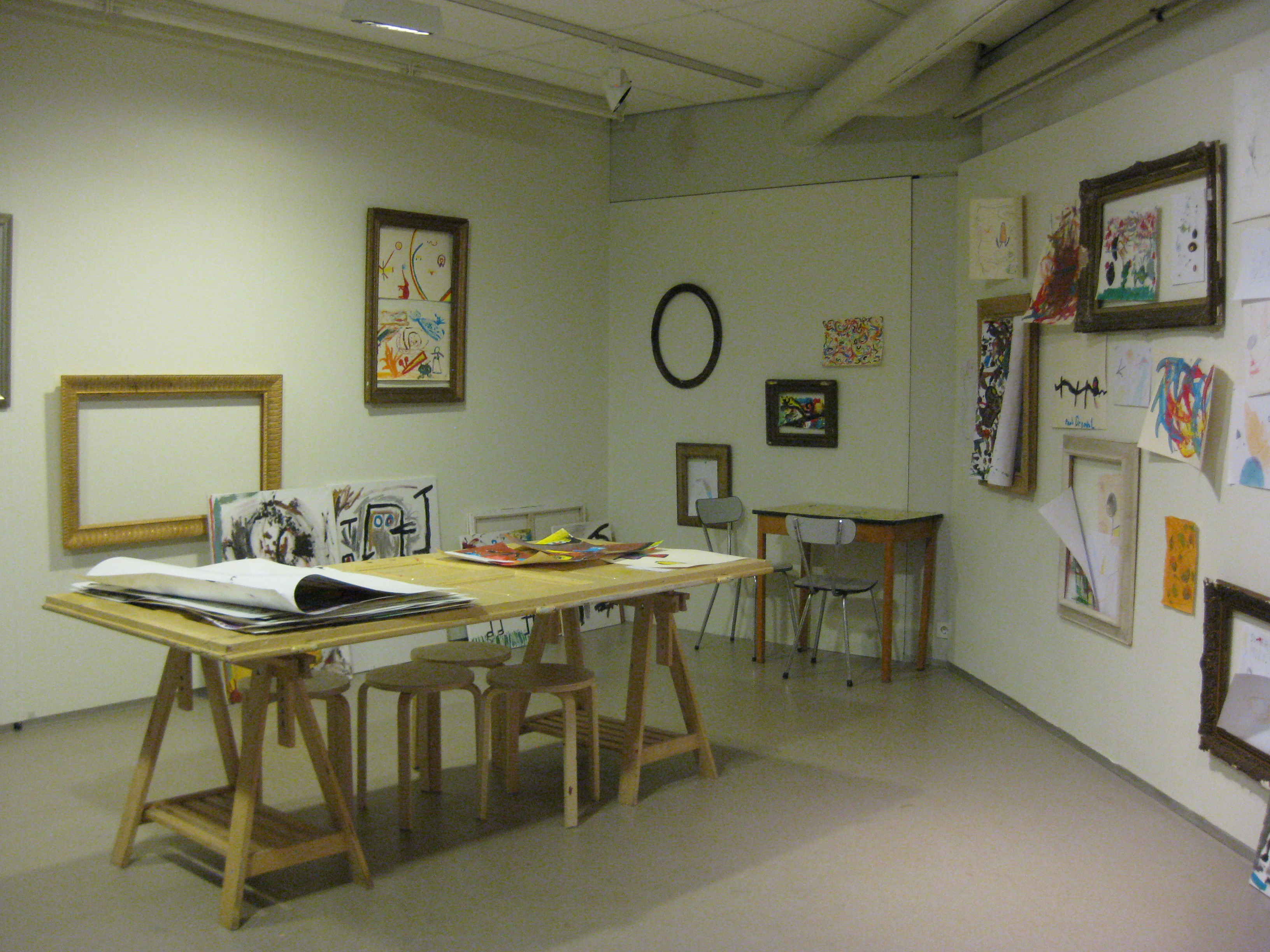 Kinderatelier in het Cobra Museum in Amstelveen